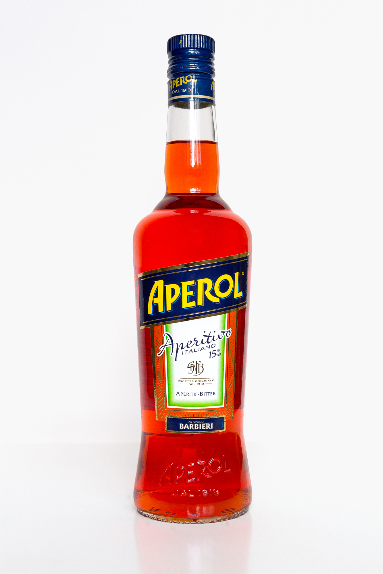 Aperol-Flasche